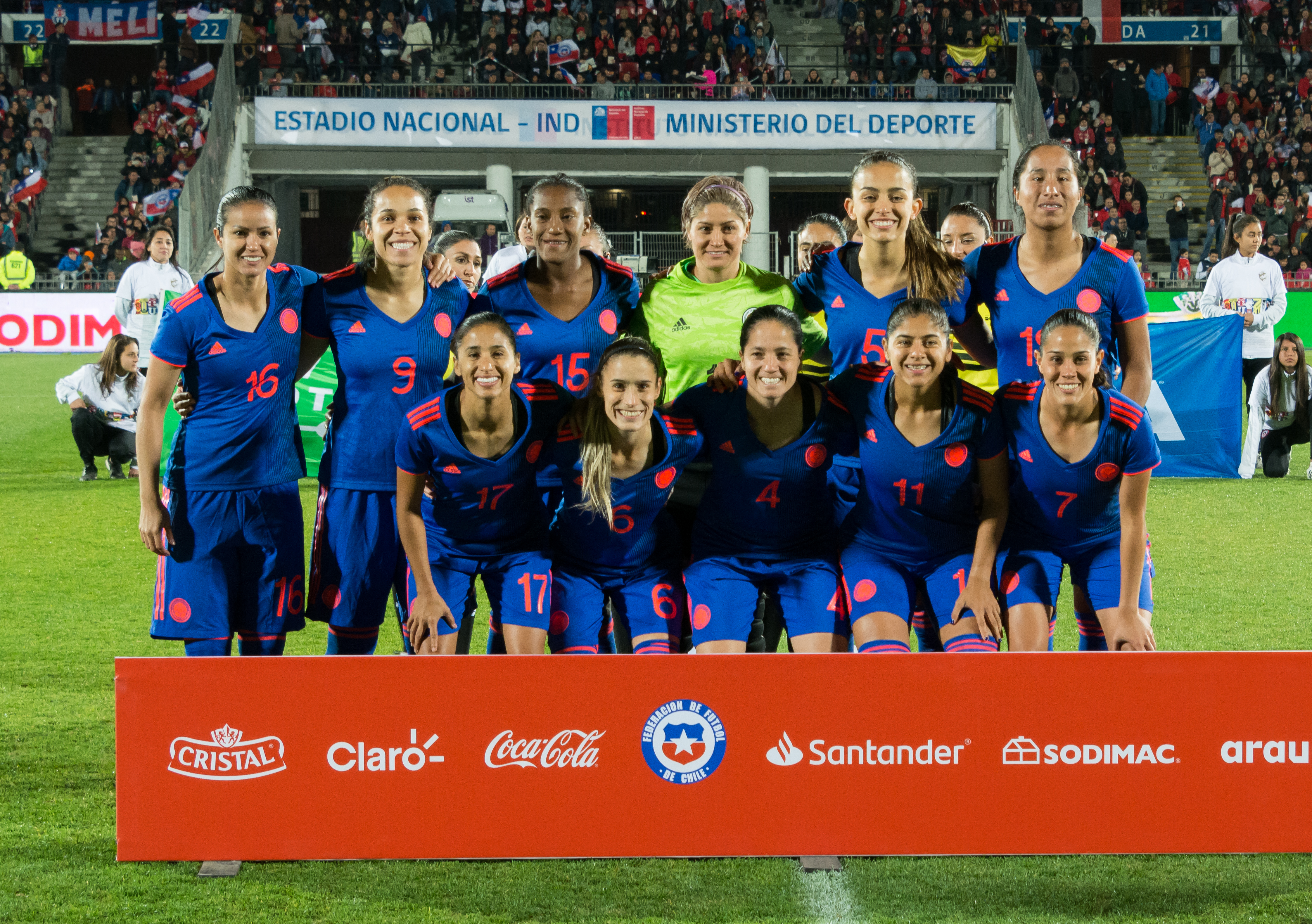 Selección femenina de fútbol de Colombia, Chile v Colombia, Estadio Nacional, Ñuñoa, Santiago, Chile.